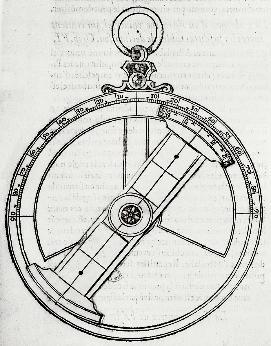 Astrolabe nautique donnant directement la latitude.